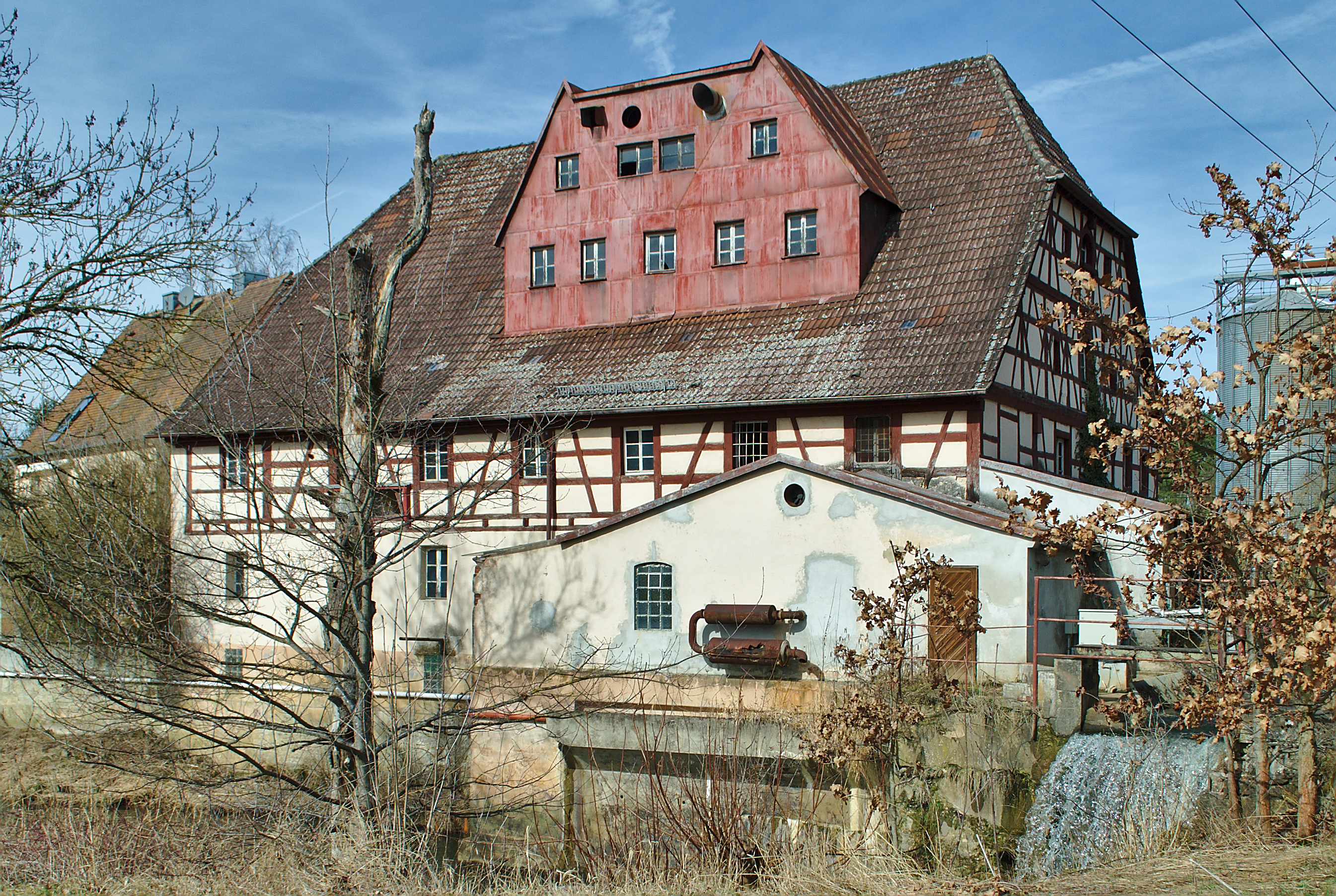 Habernhofermühle bei Uttenreuth This is a photograph of an architectural monument.